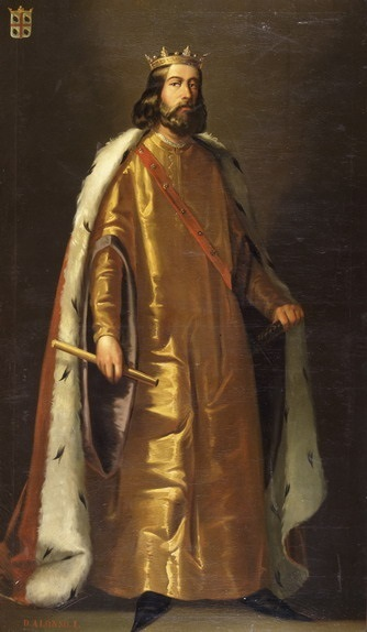 Retrato imaginario del rey Alfonso I de Aragón († 1134), que fue hijo del rey Sancho Ramírez y de la reina Felicia de Roucy.